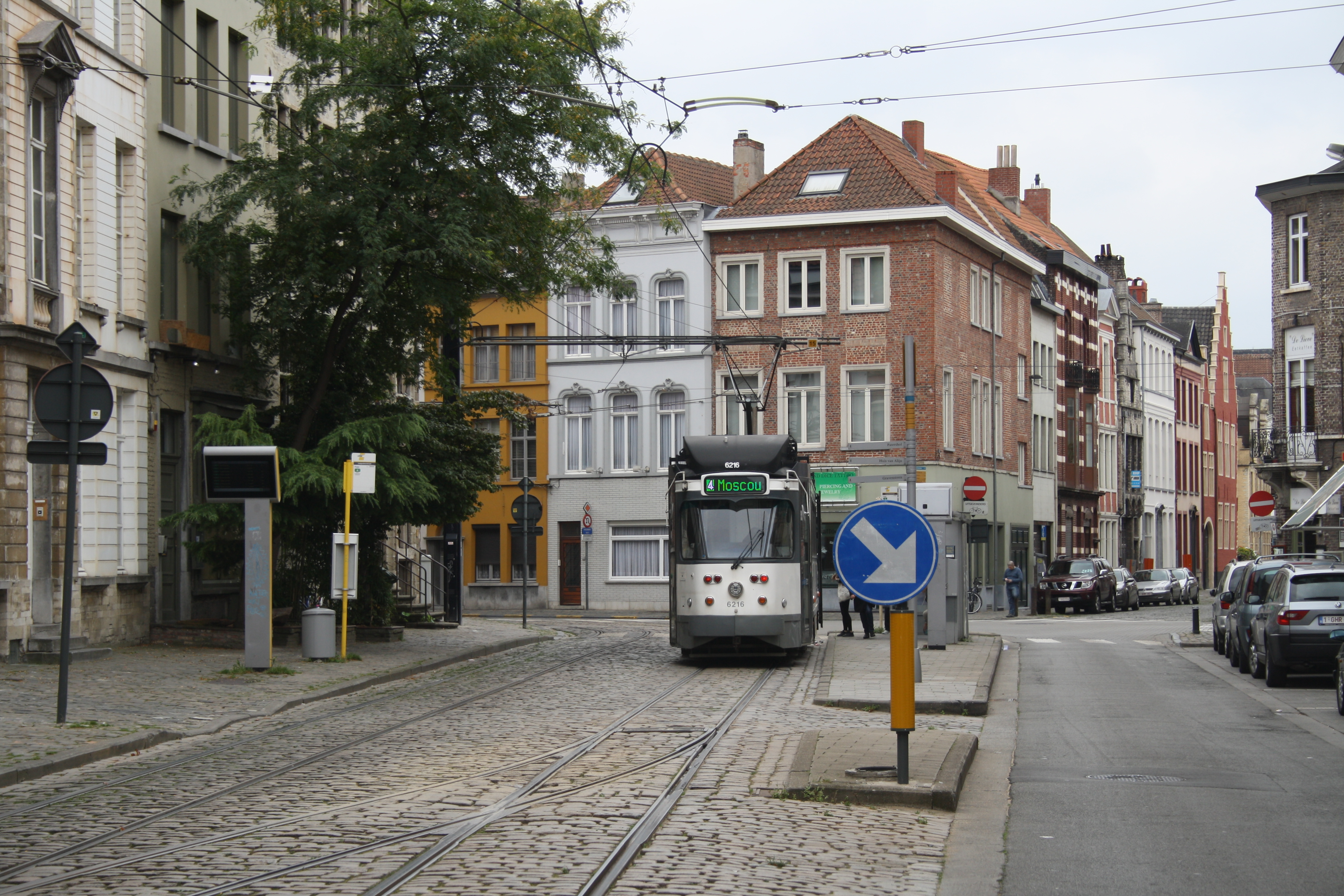 PCC in Gent